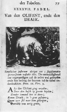 "Den Schat der Fabelen, gekozen uyt de voornaemste Verdigt-schryvers", 3 volumes illustrés de gravures, version néerlandaise rimée du "Tresor de Fables", (1739)